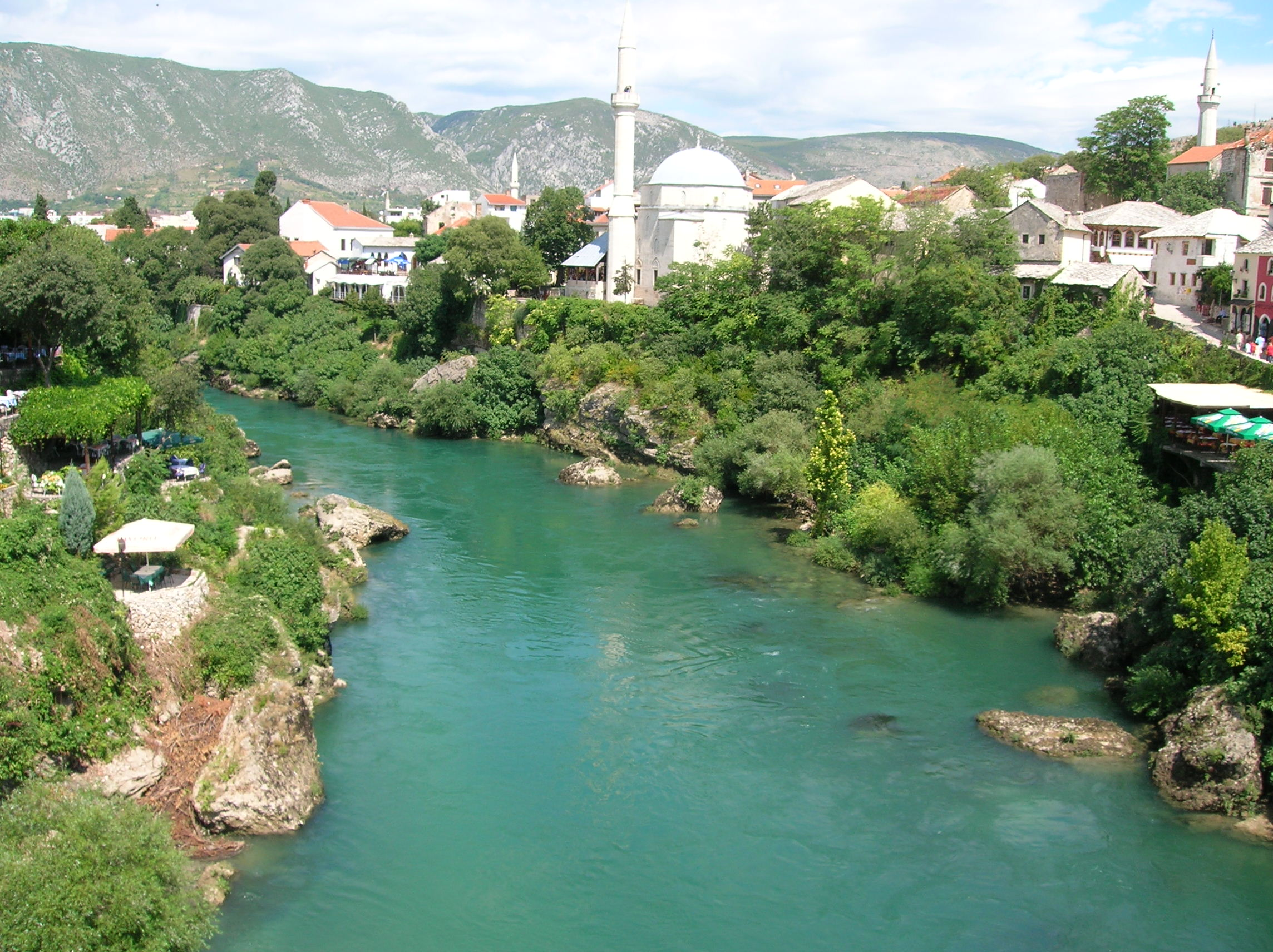 Neretva from Stari Most in Mostar